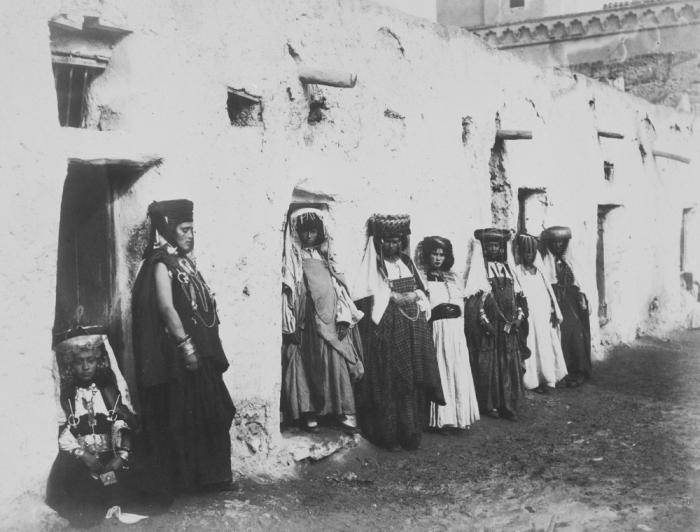 Vrouwen van de Ouled Naïl bevolkingsgroep in een dorp in Algerije, deze vrouwen zijn waarschijnlijk prostituées. This mysterious Arabic-speaking yet ethnically distinct tribe, believed to have migrated from Morocco hundreds of years before the French conquest, inhabited the Ouled Nail mountains and by tribal custom sent their young women to the oases to acquire their dowries as dancers at public festivals and in cafés, choosing from among their admirers generous patrons. When their dowries were adequate they returned to their mountain villages and would marry within the tribe. Even while they practiced their profession in the oases, they fasted Ramadan and patronized the shrines of Muslim awliya (holy men or women) like any other pre-colonial Algerian Muslims, to the bemusement of the French. They were an ancient geisha caste of North Africa in a pre-modern context that could tolerate within the social rituals of tribal sanctity the profane as well as the sacred. In time the centralizing, rational, bureaucratic modern colonial state would reduce many of the Ouled Nail to prostitutes and register them as such. The destruction of the traditional economy and subsequent impoverishment of that part of the countryside that wasn't grabbed up by the French settlers following the conquest would drive some of the Ouled Nail into the brothels of Algiers and Tunis.